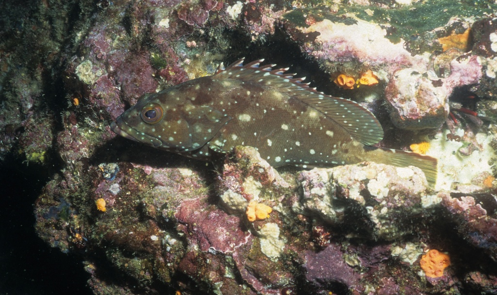 Flag cabrilla (Epinephelus labriformis), Galapagos Islands, Ecuador